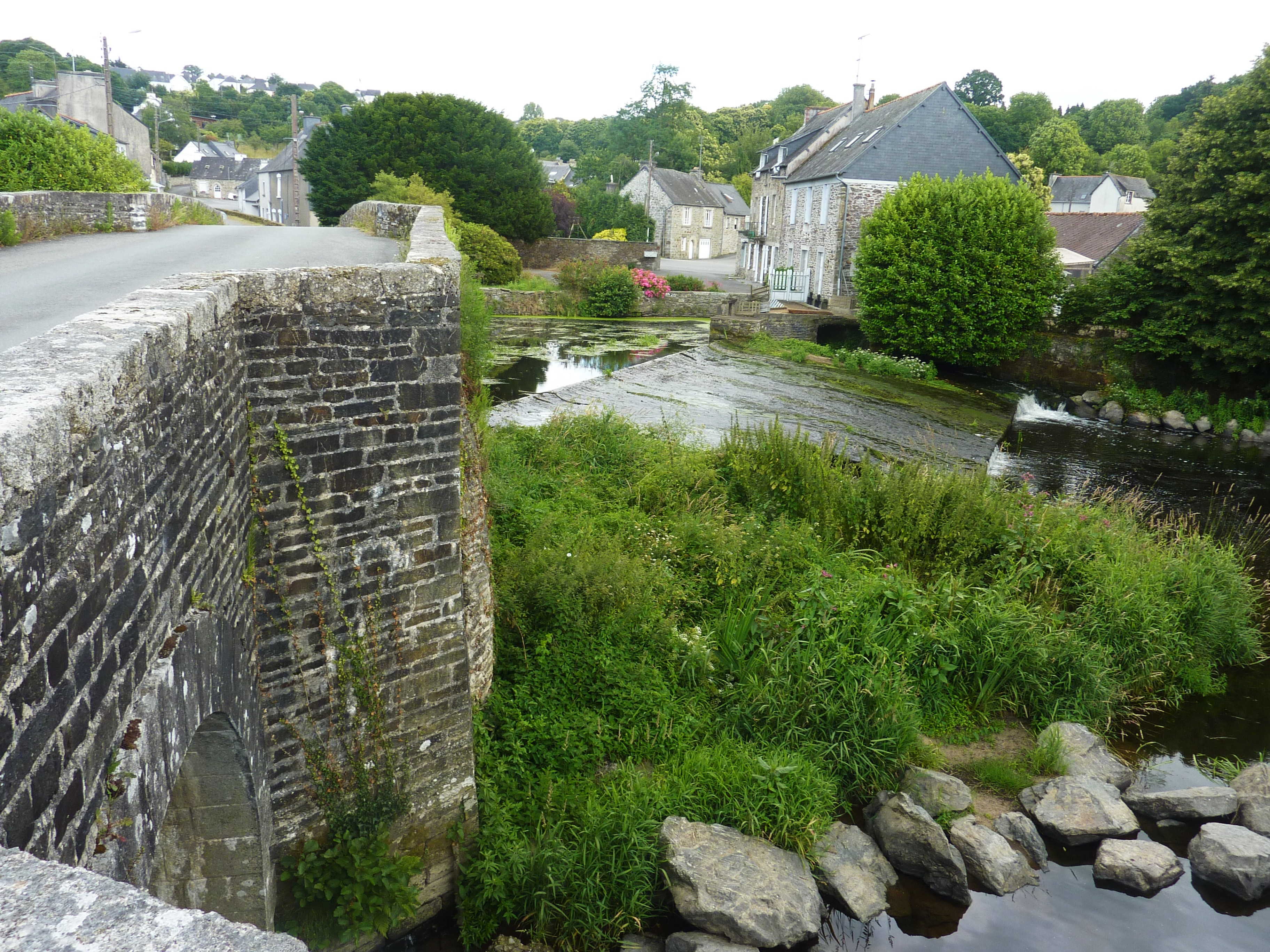 Carhaix-Plouguer : le pont du XVIIIe sur l'Hyères et le Petit Carhaix